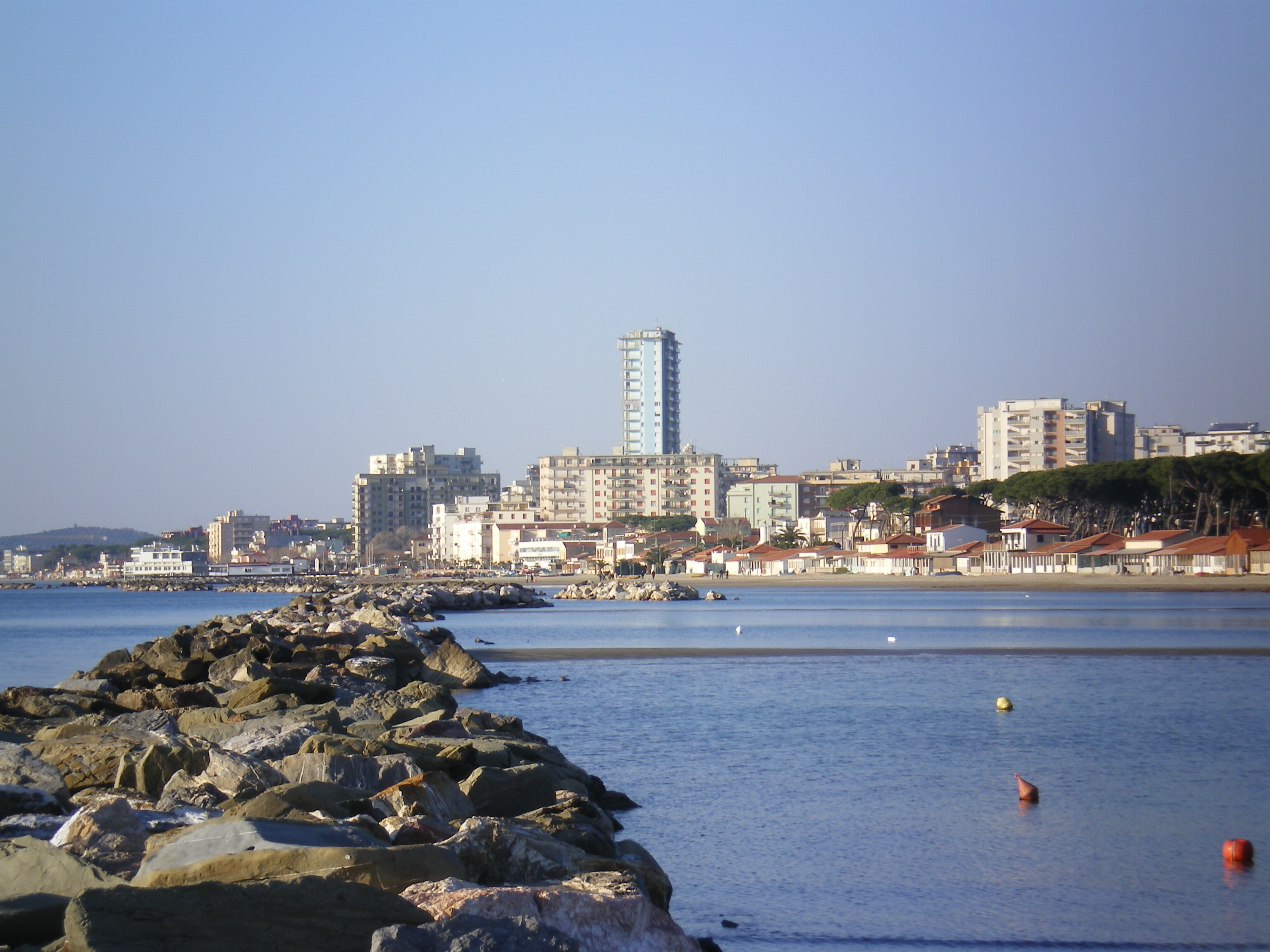 Vista di Follonica dalla Spiaggia di Levante, Senzuno